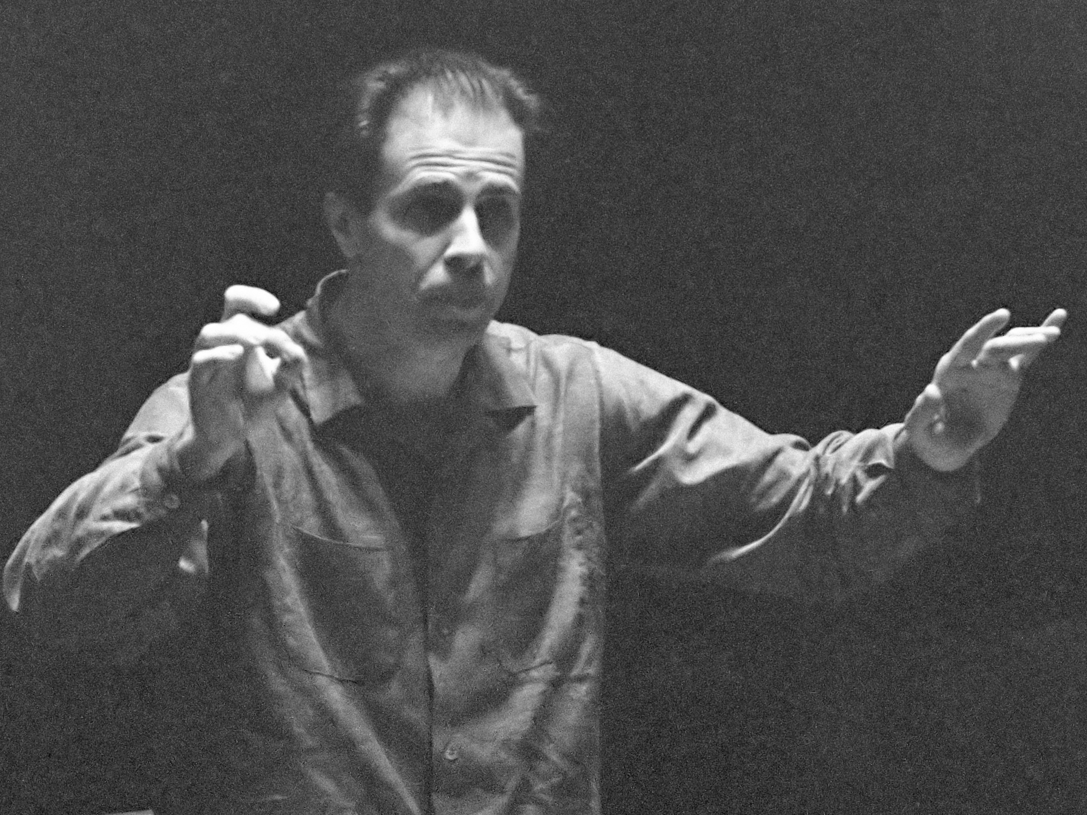 Donald Johanos gastdirigent Concertgebouworkest, tijdens de repetitie 21 februari 1963